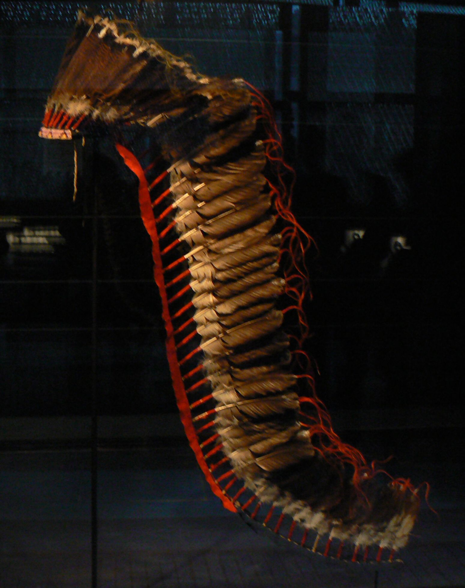 Lligadura de plomes dels indis siux, a la regio de les planes d'amèrica del nord, de finals del segle XIX. serveix per a reconéixer honors de guerra. Està feta amb crin de cavall, plomes, plumo, contes de vidre i pany de llana. Es troba al museu del Quai de Brainly de Paris.